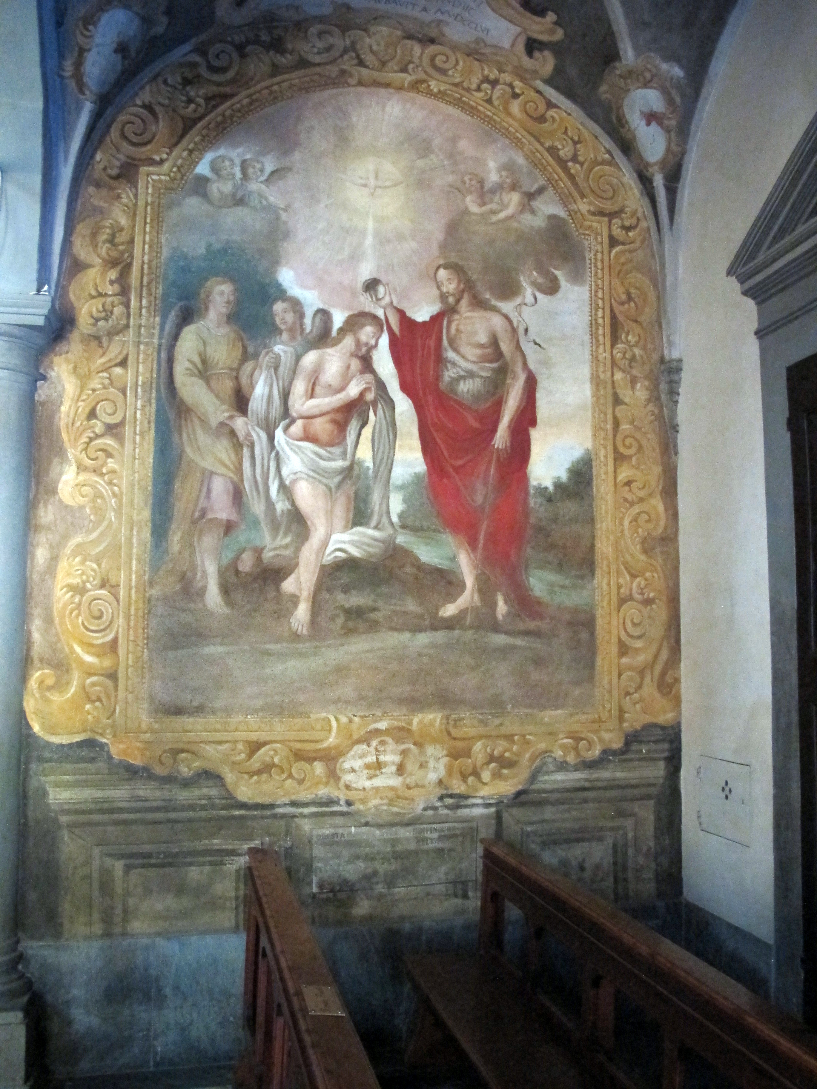 Pieve di Santa Maria Novella, Marti